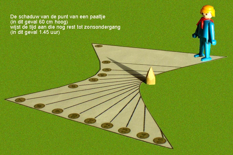 Schaalmodel voor een horizontale zonnewijzer die co-Italiaanse uren (tijd die rest tot zonsondergang) aangeeft